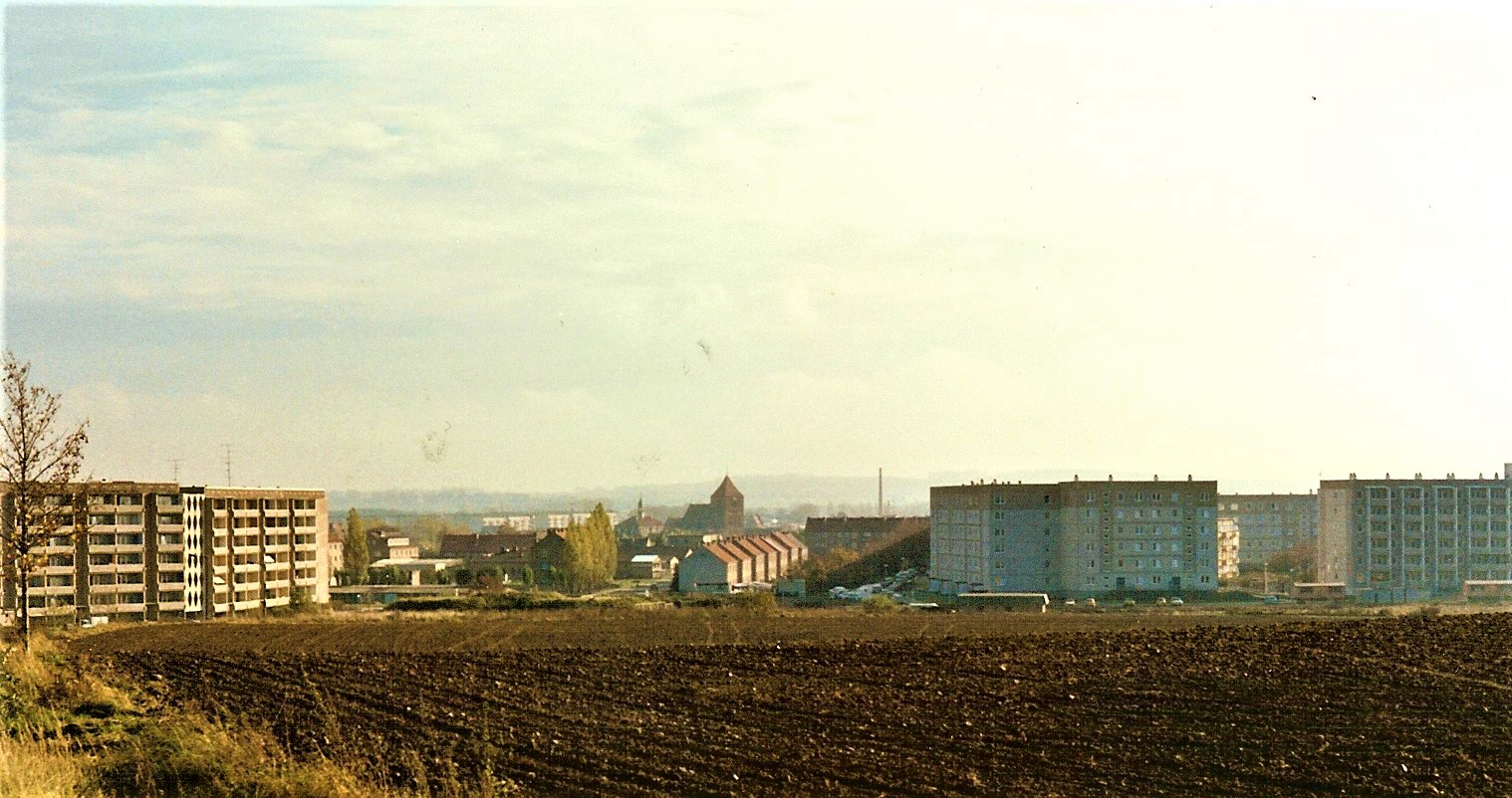 Blick auf Teterow Anfang November 1989